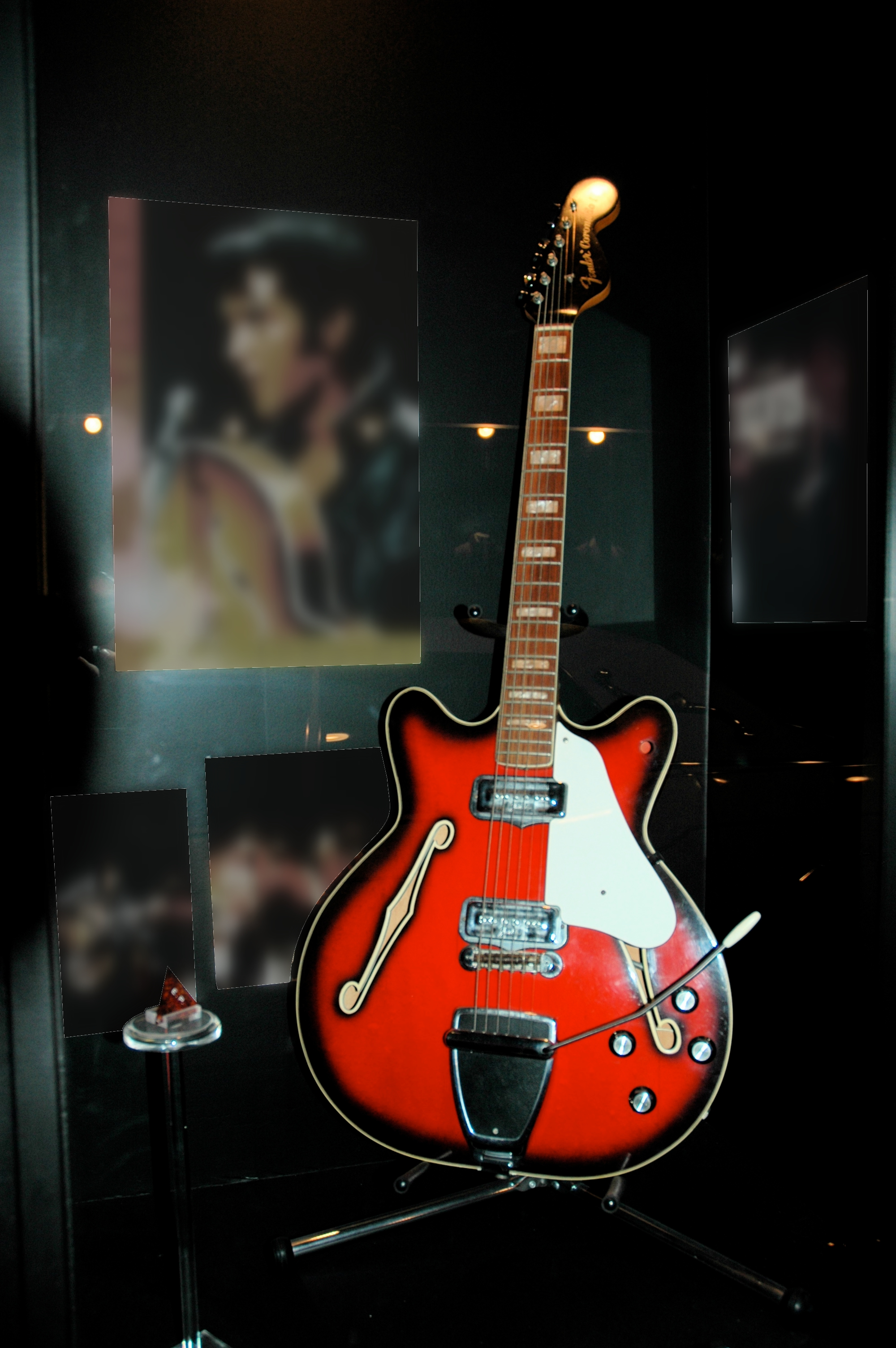 Elvis Guitar